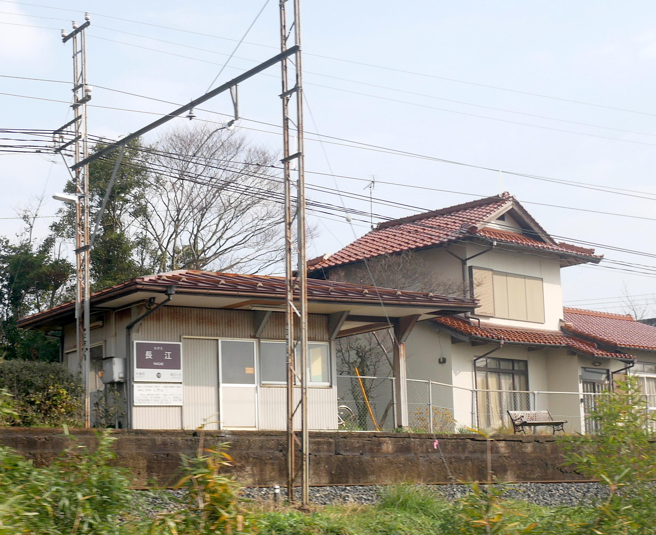 Nagae Station (長江駅)